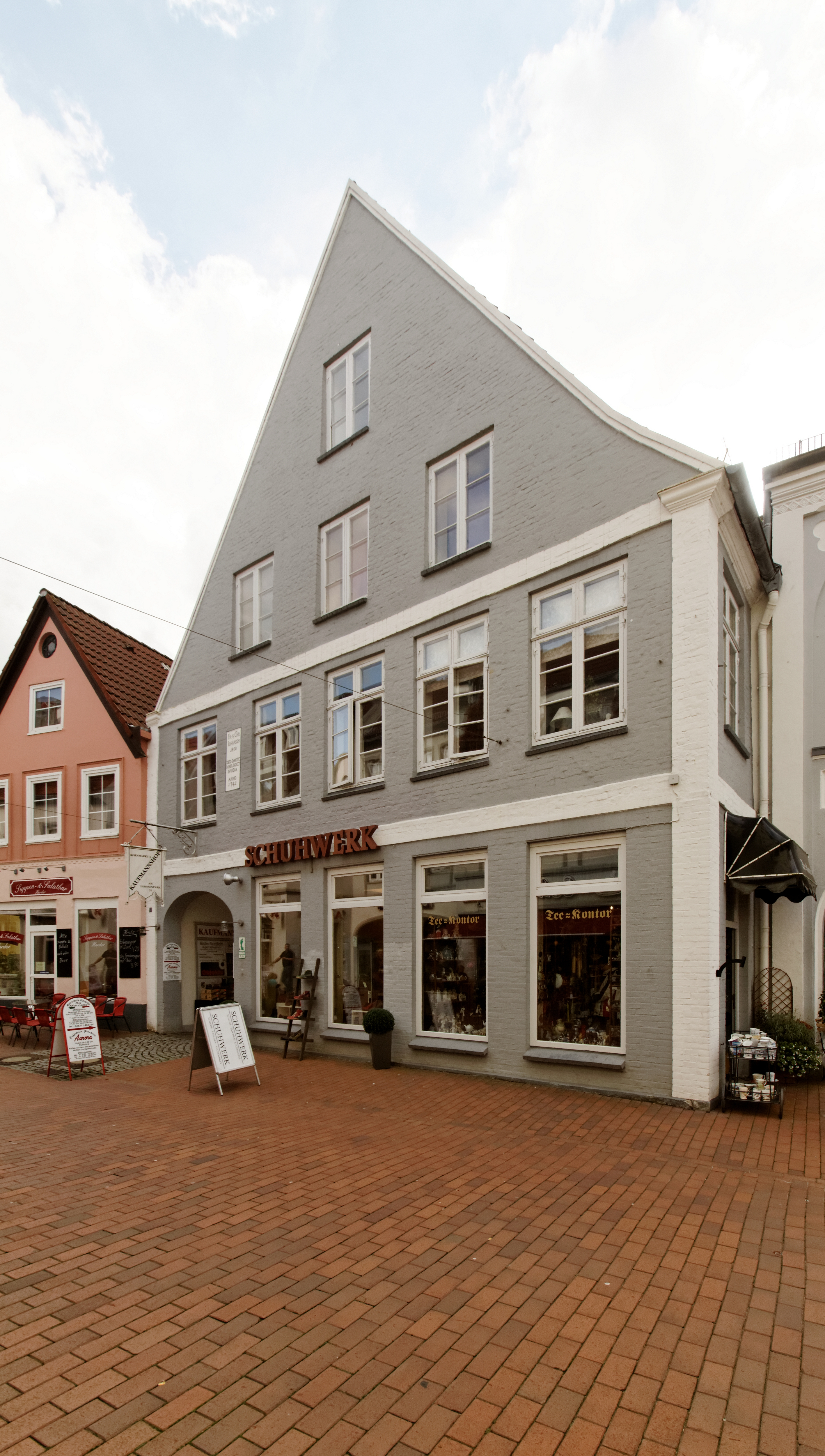 Schleswig, Kornmarkt 3; Wohn- und Geschäftshaus